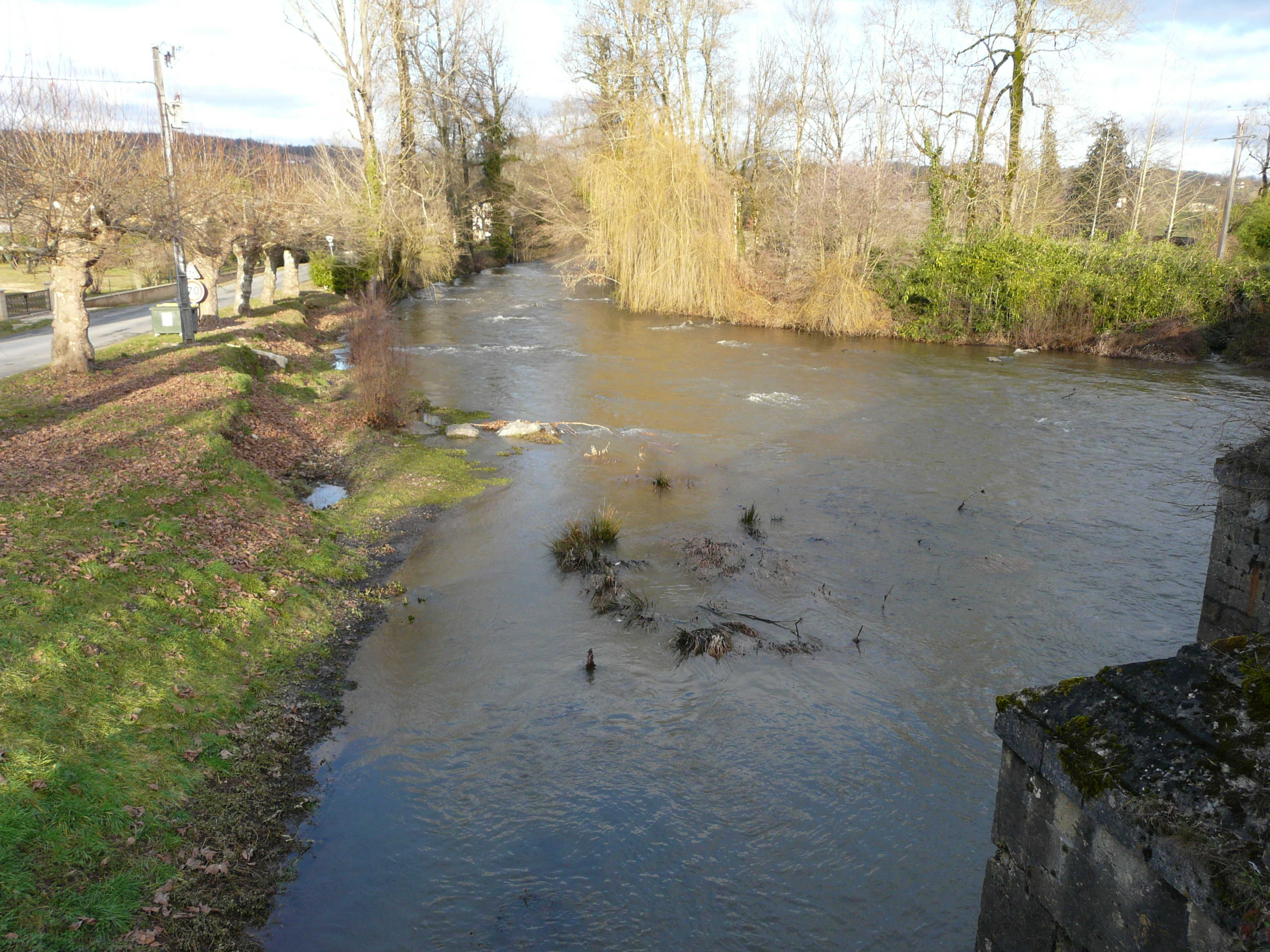 La Loue en amont du pont de la RD 705, Saint-Médard-d'Excideuil, Dordogne, France.